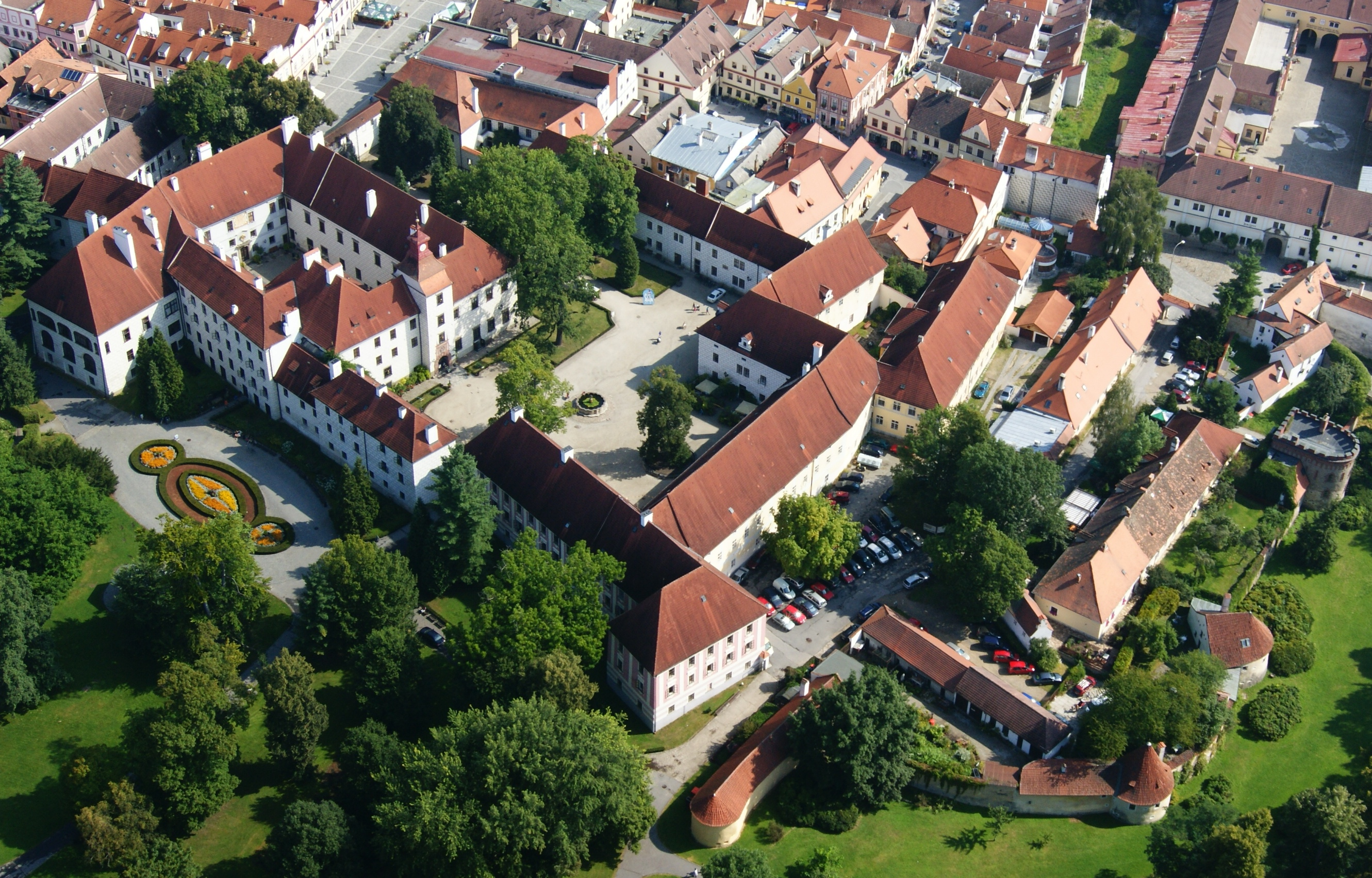 Zámek Třeboň, Třeboň 111